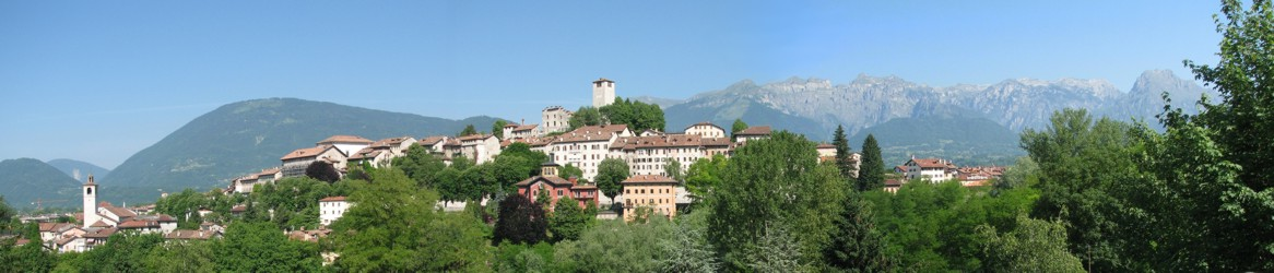 Panoramica di Feltre (BL)